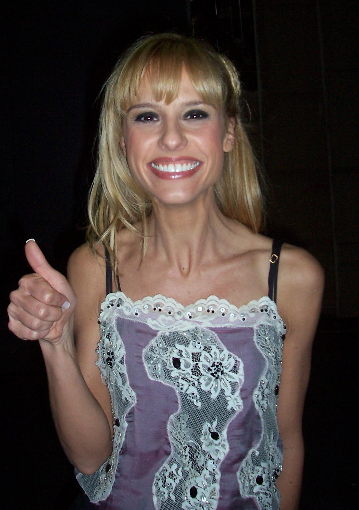 La actriz y presentadora de televisión argentina Mariana Fabbiani, al terminar de conducir RSM en los estudios de América Televisión, en el barrio porteño de Palermo.